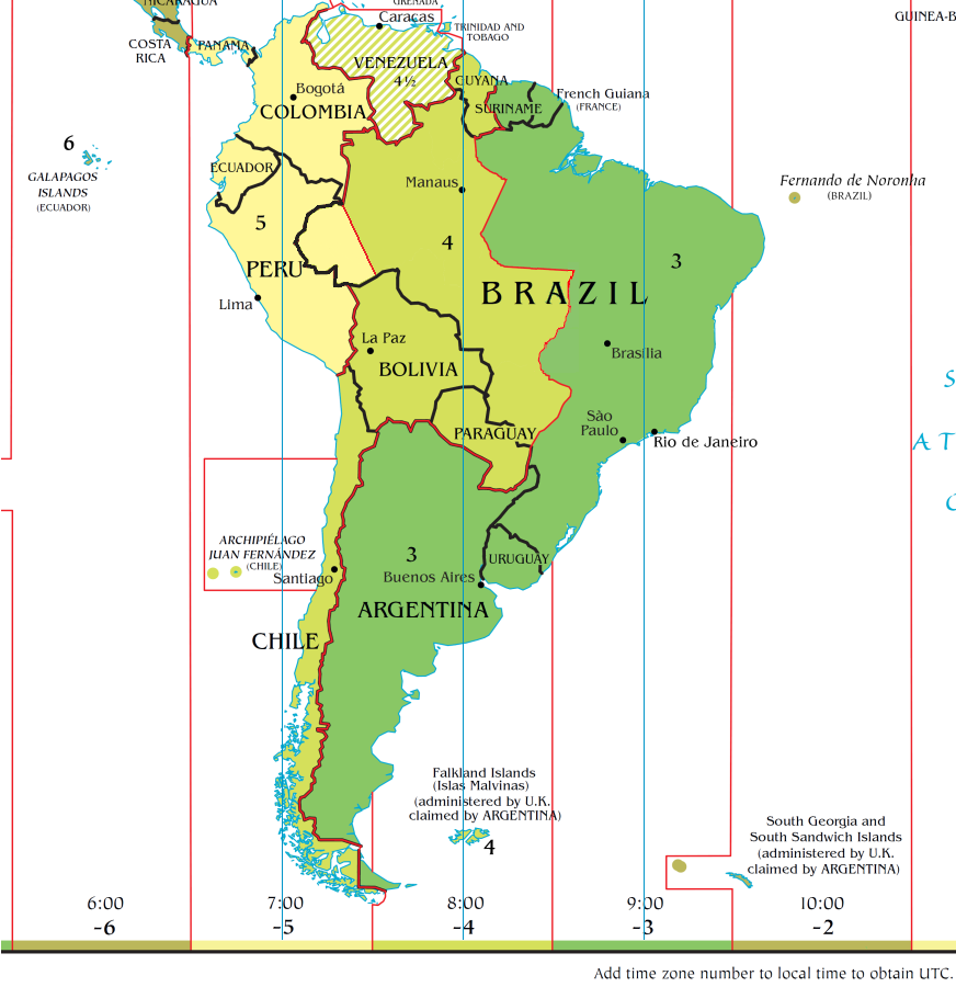 Карта часовых поясов Южной Америки